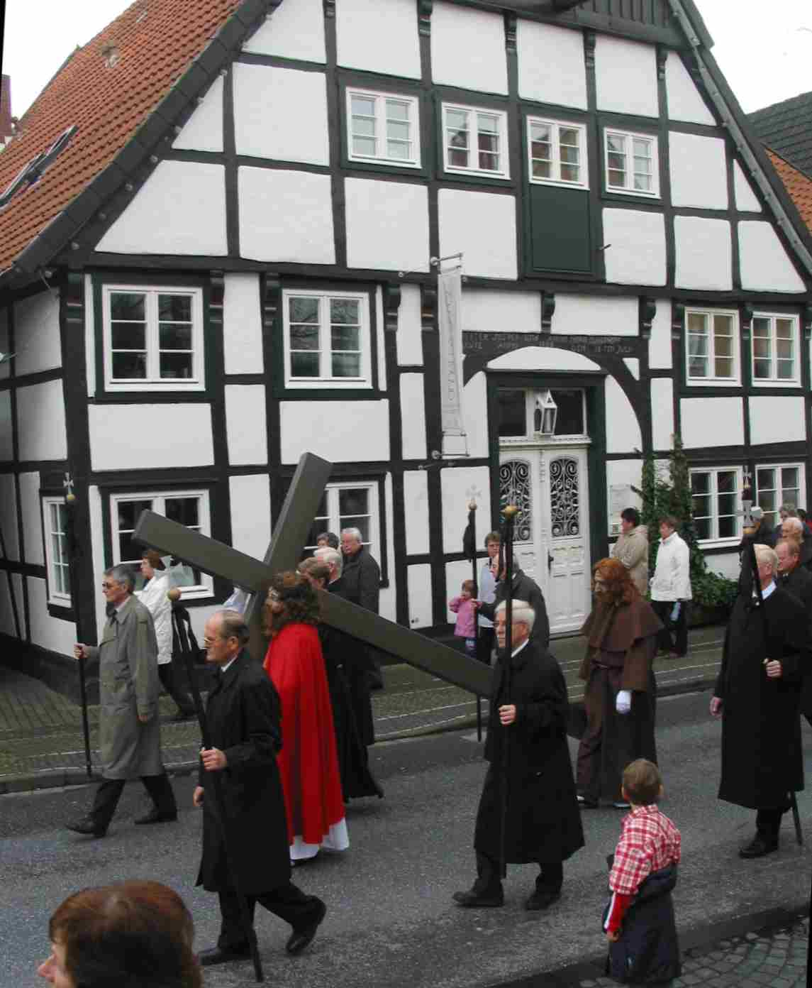 "Karfreitagsprozession Wiedenbrueck: Bei Krane Optik"